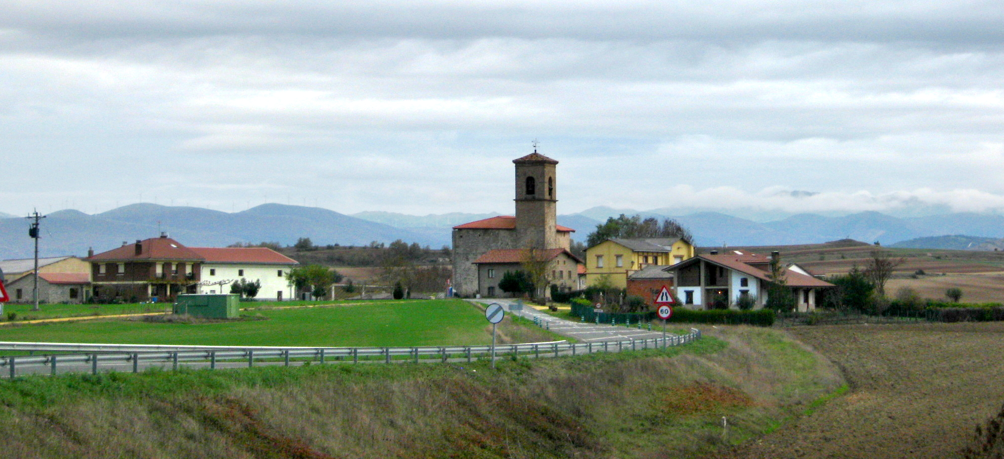 Lubinao herria (Gasteiz, Araba)